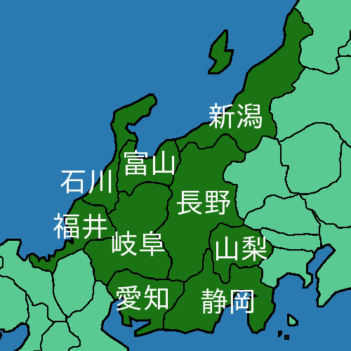 中部地方の自治体